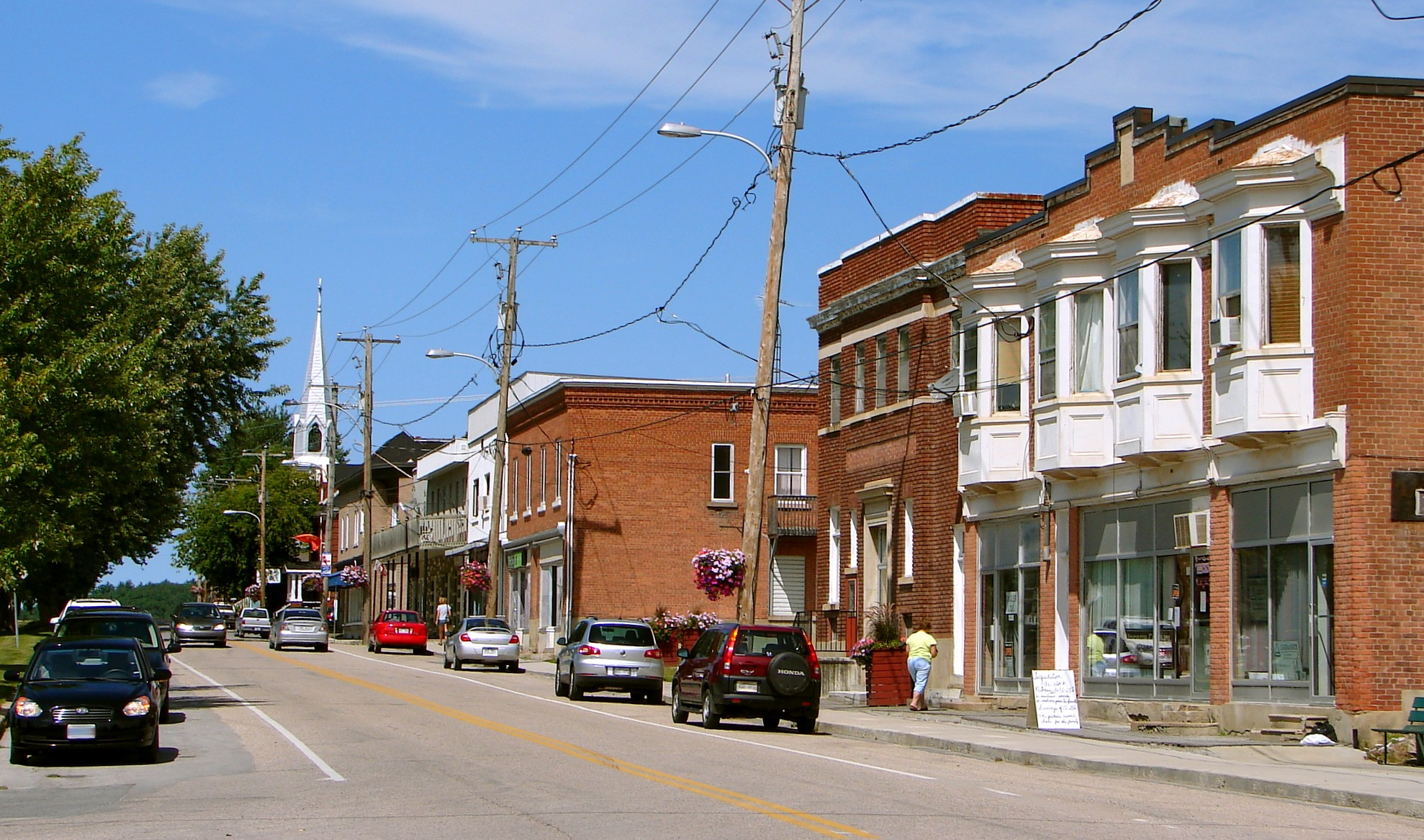 Campbell's Bay, Quebec, Canada